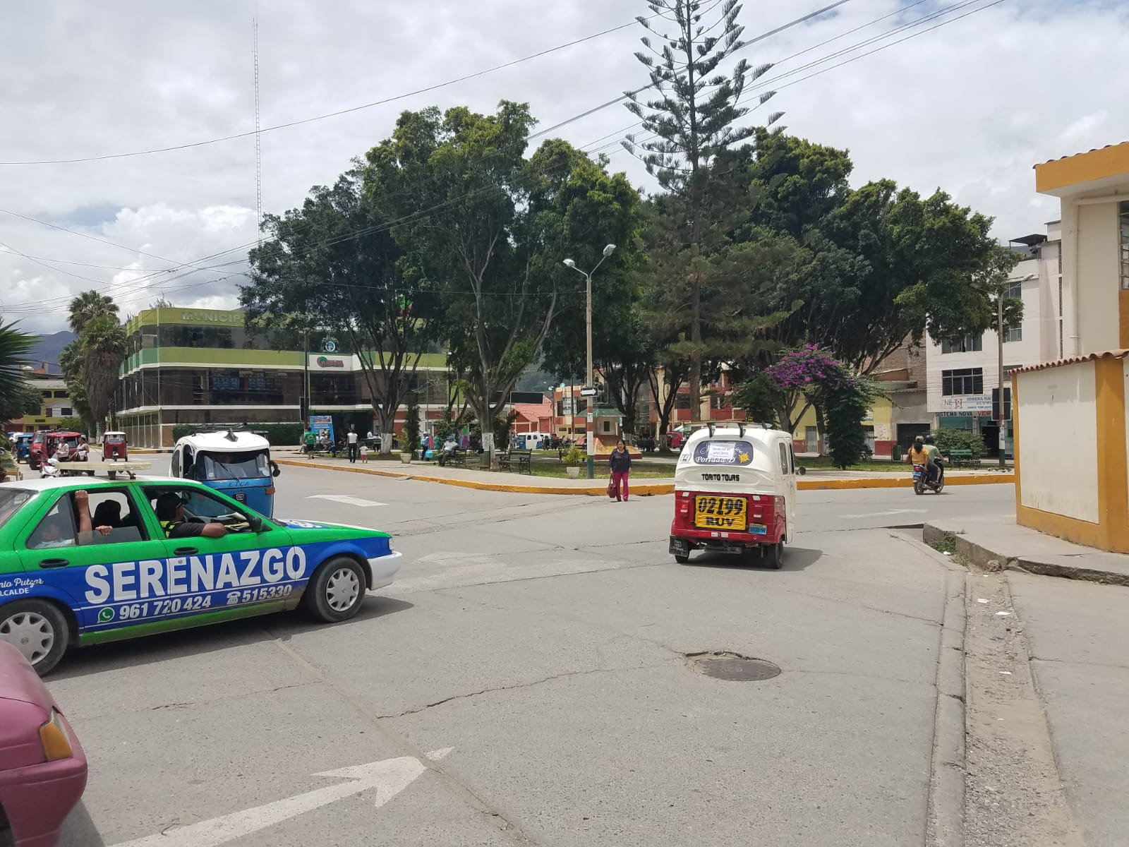 Plaza y municipalidad de Amarilis